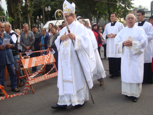 Festa do centenário da catedral... tirado por mim :)